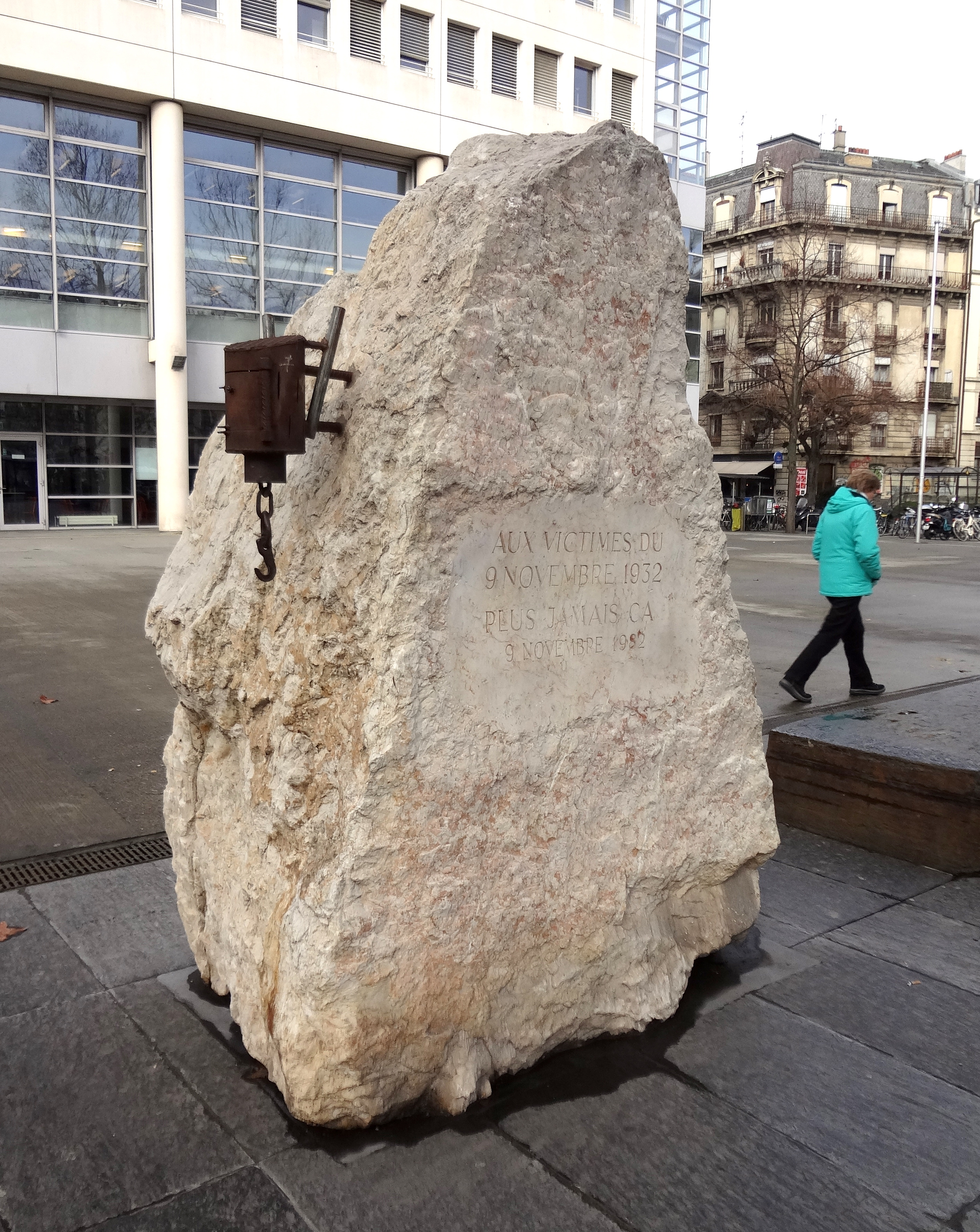 Monument commémoratif des événements du 9 novembre 1932 à Genève. Inscription : « Aux victimes du 9 novembre 1932 – Plus jamais ça – 9 novembre1982 ».